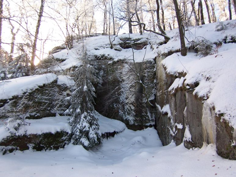 Mutmaßlicher Steinbruch der Frankenburg (Modenbachtal, Pfälzerwald).